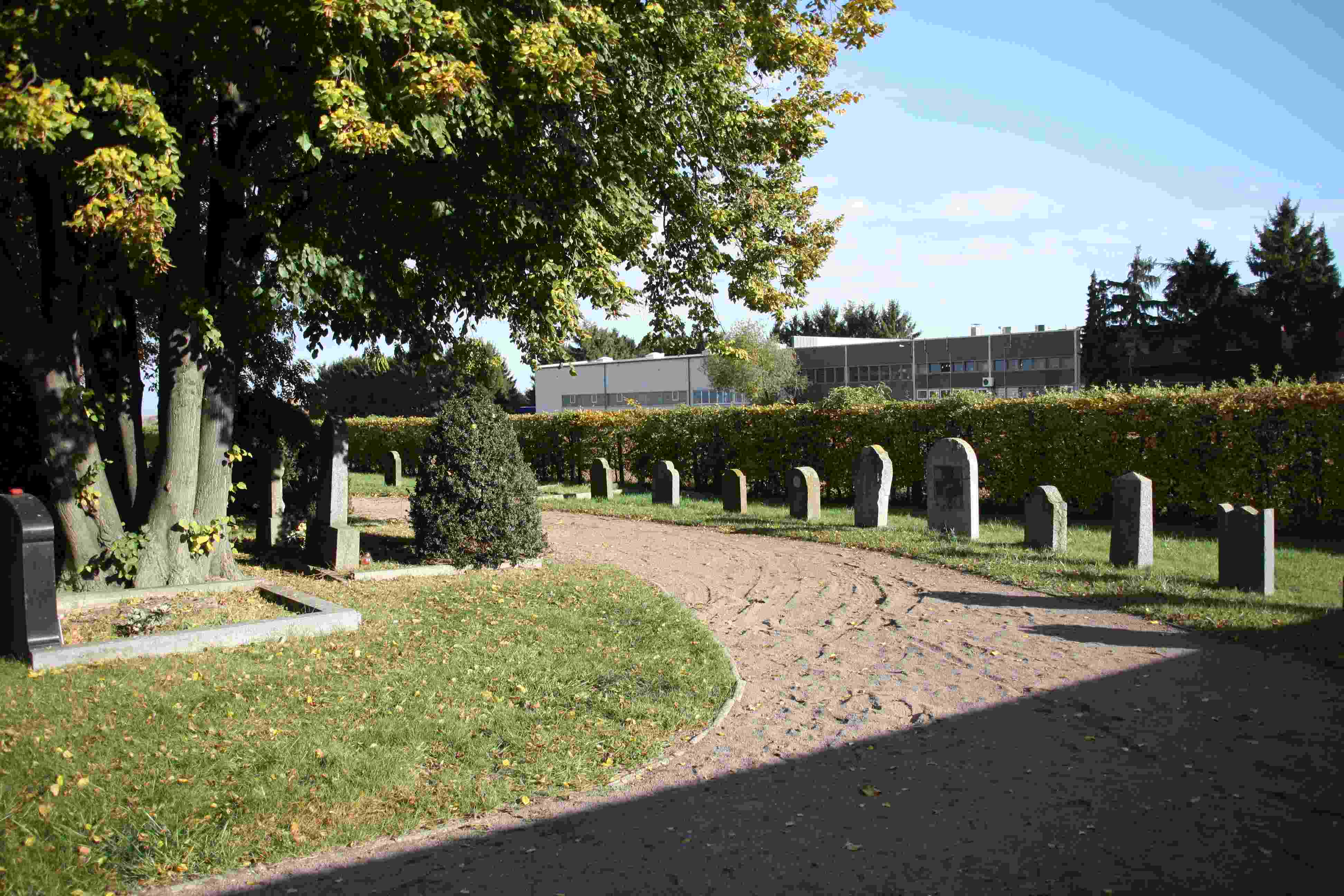 Jüdischer Friedhof Frauenberger Straße Euskirchen 06